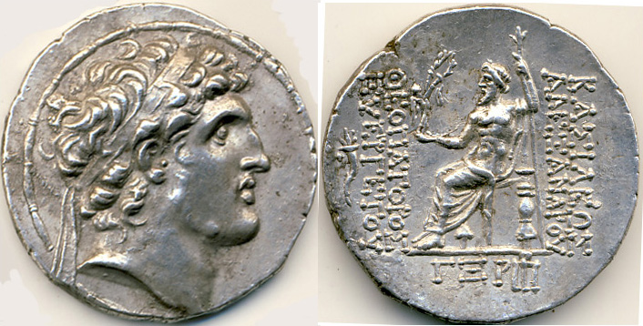 Alexander I. Balas, 150-145 v. Chr. AR-Tetradrachme. Antiochia